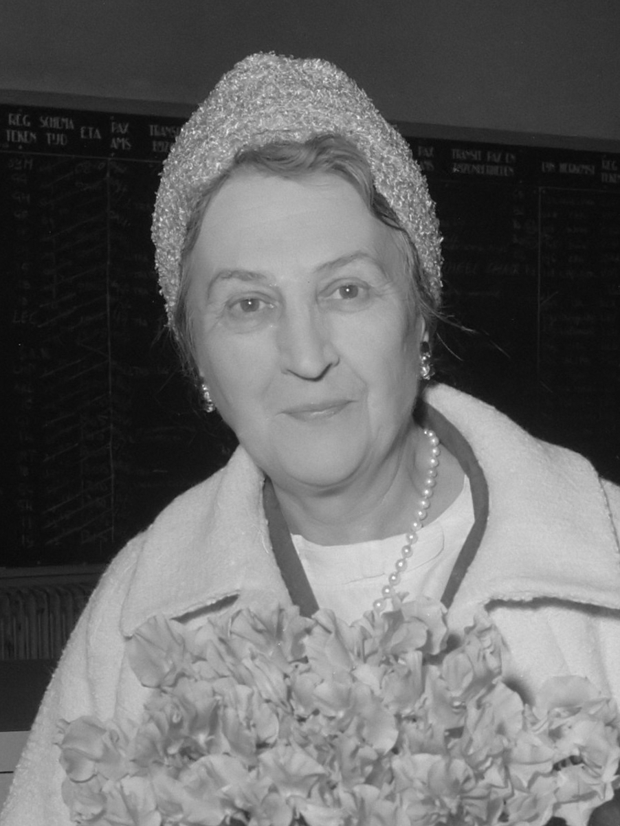 Beroemde harpiste op Schiphol ( mevrouw Maria Korchinska) 22 juli 1960